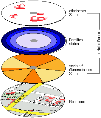 Segregation 3status